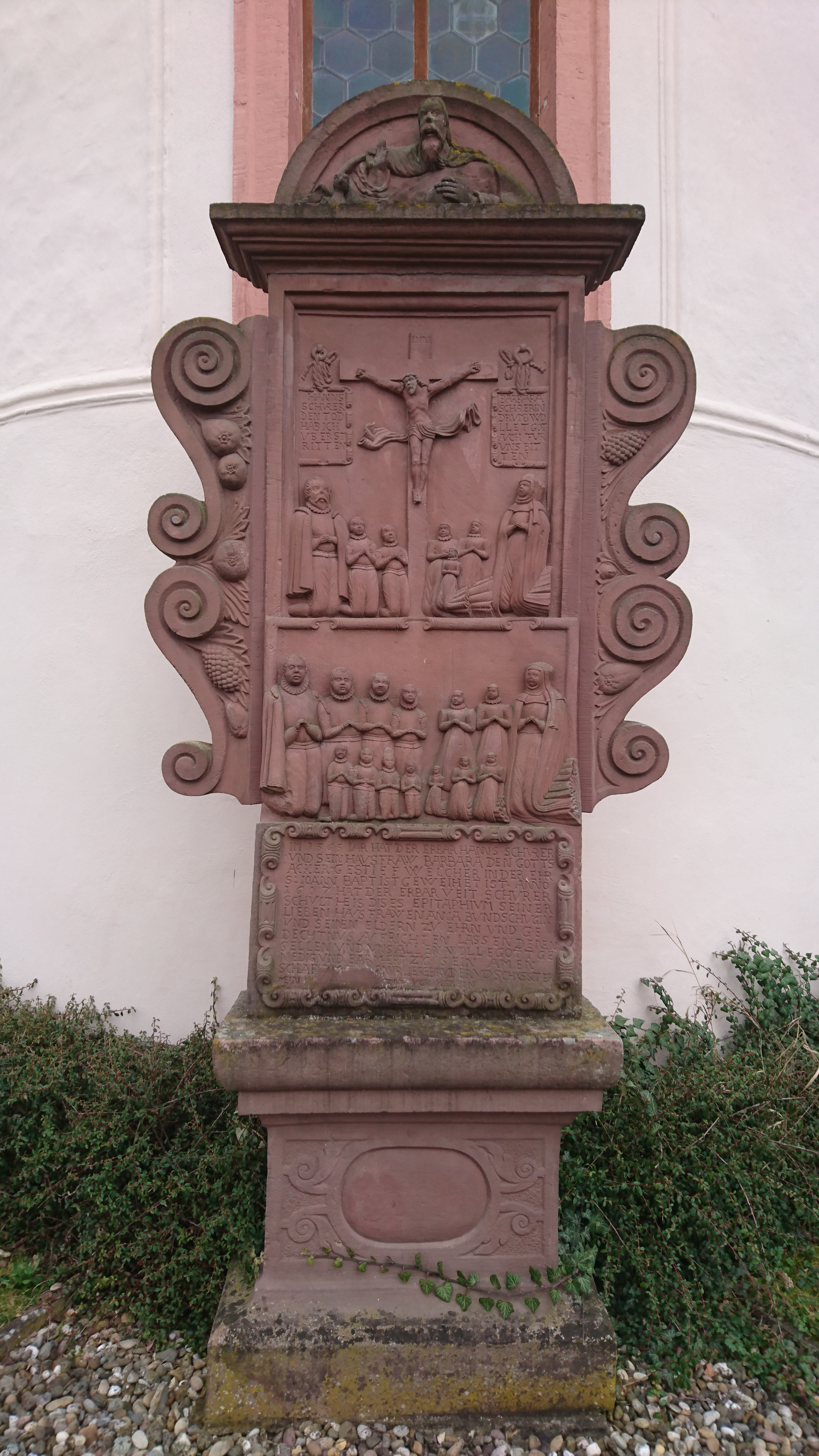 Friedhof mit Friedhofskapelle in Hochhausen (Tauberbischofsheim) - außen. Schürer-Denkmal, von 1607, an der Rückseite der Hochhäuser Friedhofskapelle von 1585. Teil der Sachgesamtheit Friedhof.